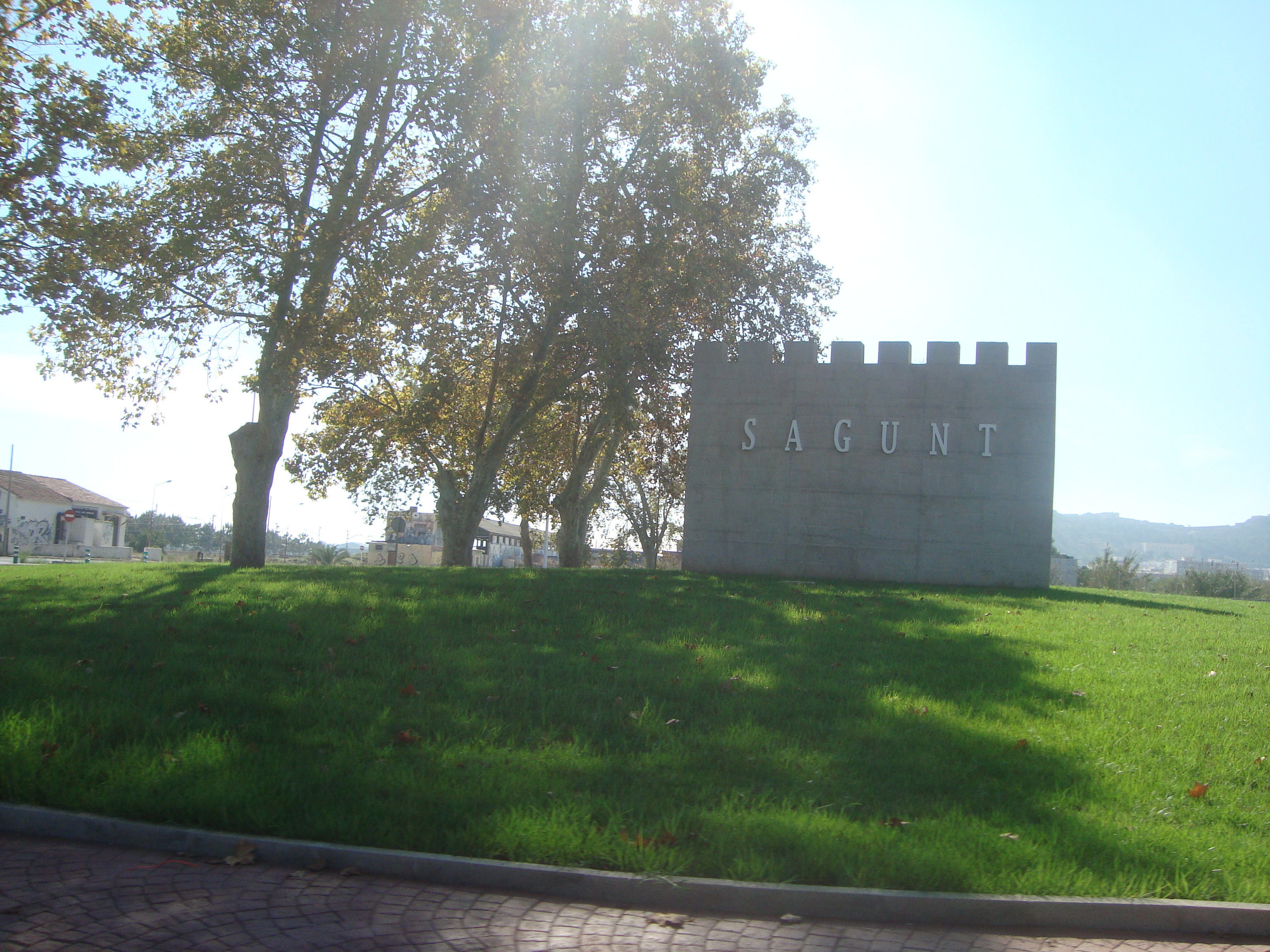 Sagunto panel icónico